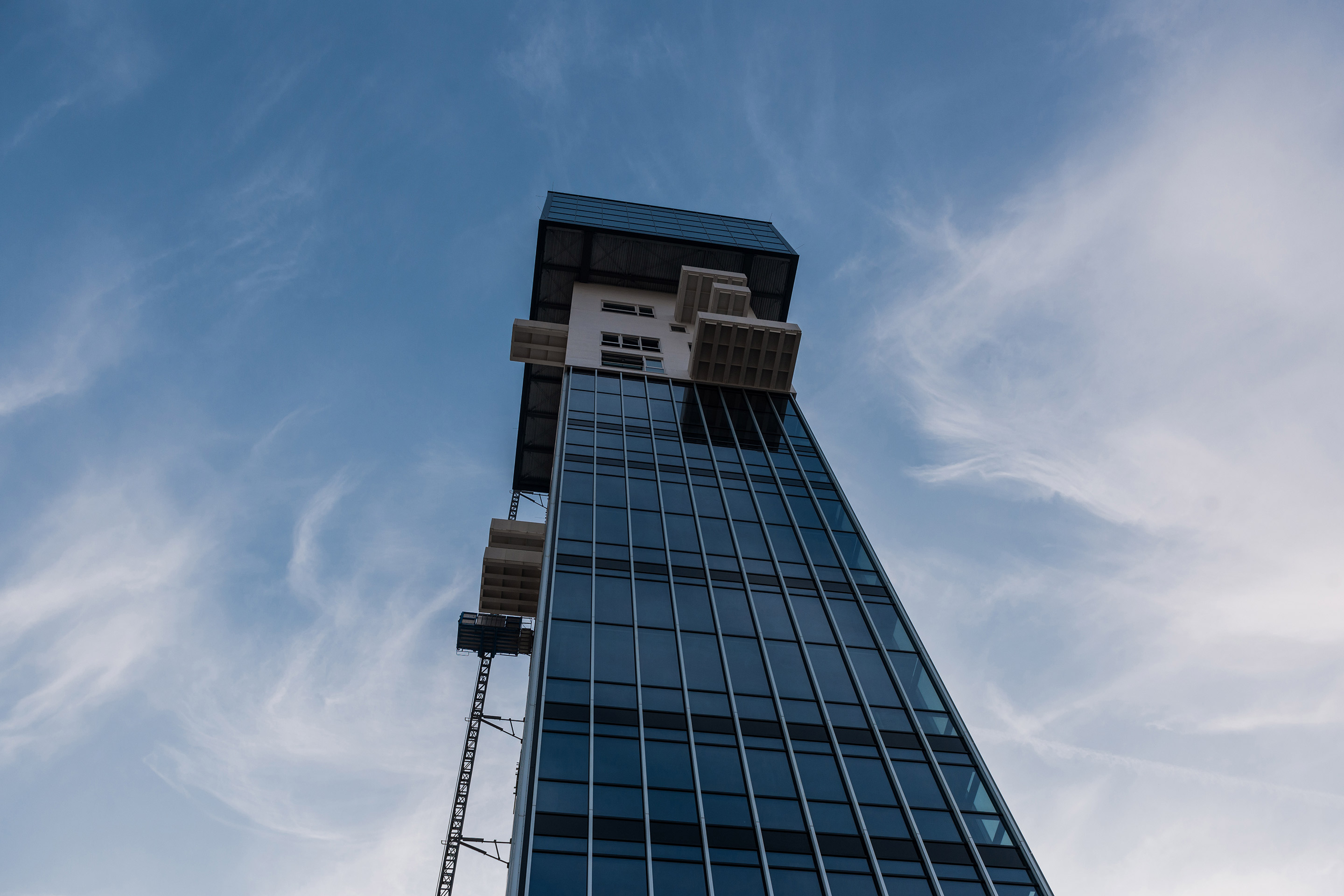 Vista della Tower dal basso, foto di Andrea Garzotto